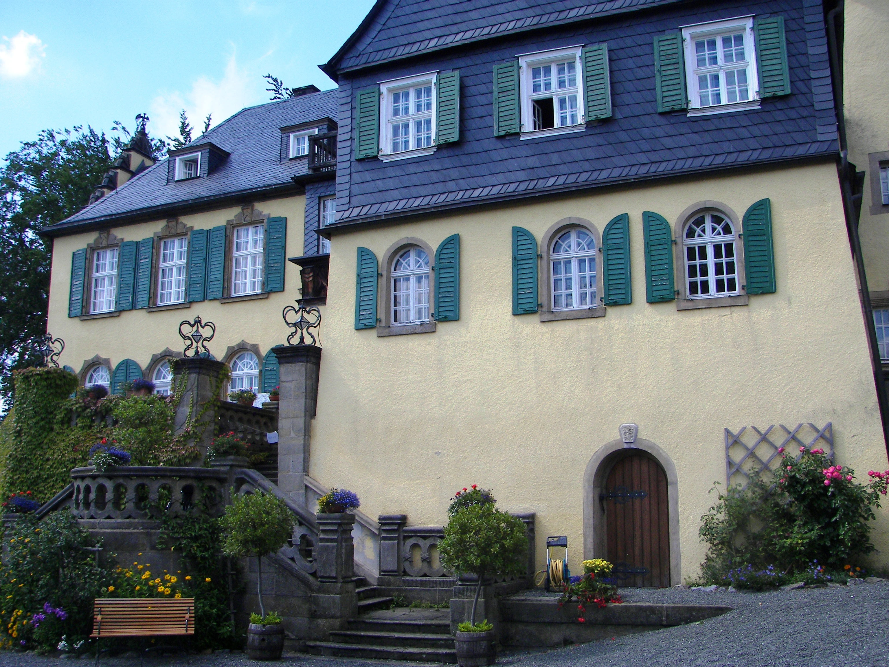 Schloss in Heinersreuth, Gemeinde Presseck, Besitzer: von Lerchenfeld